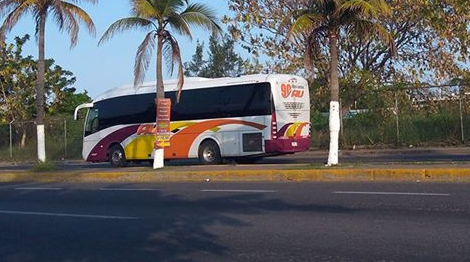 Unidad Scania Irizar i5 de Servicio Intermedio de Autobuses Unidos AU en Veracruz